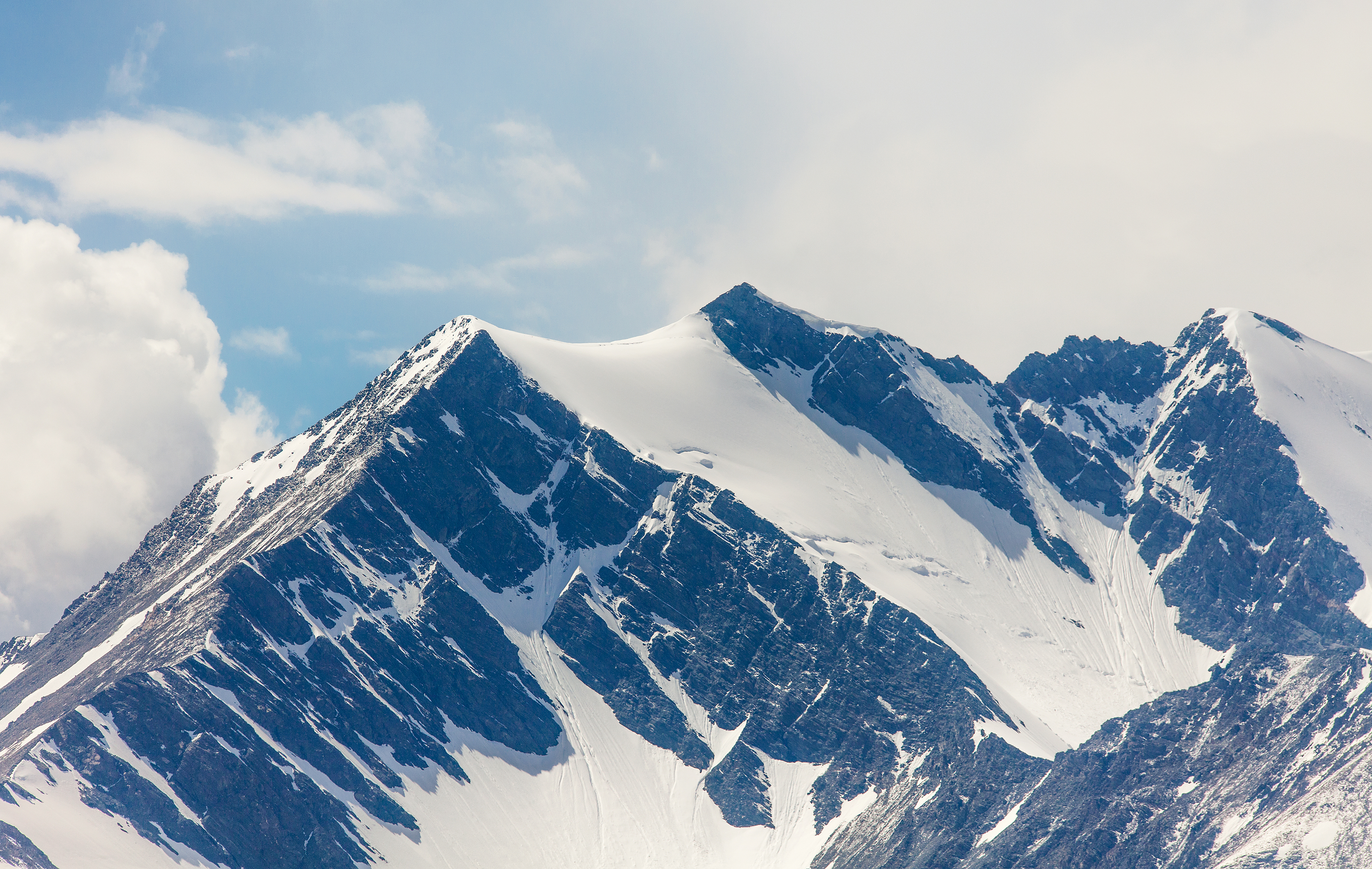 Вершина Ирбисту